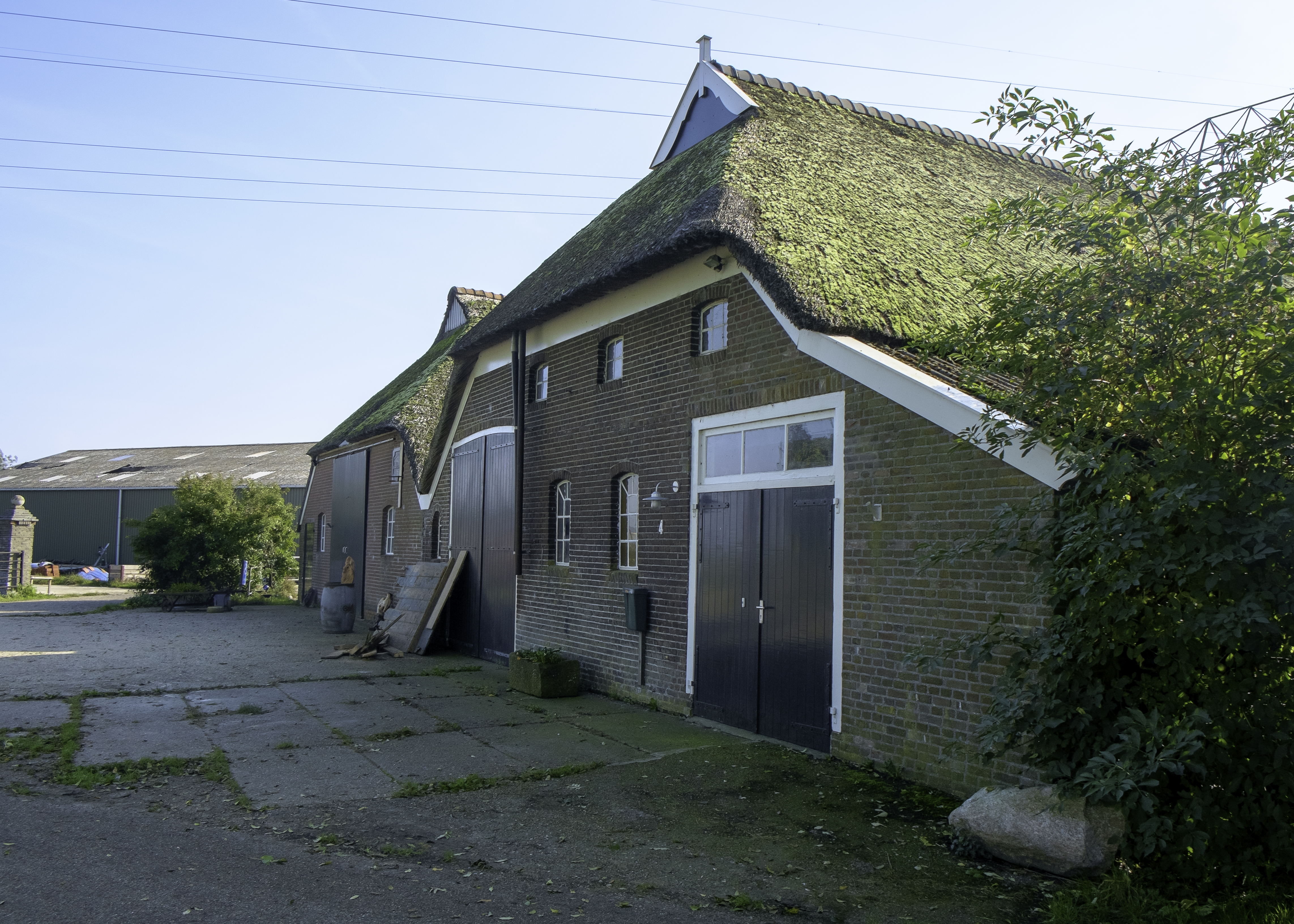 boerderij De Horsten aan de Meester Koolweg 4. Voormalige cichoreifabriek.